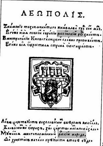 Адельфотес. Львов, 1591. Страничка с гербом города Львова и гераальдическими стихами.